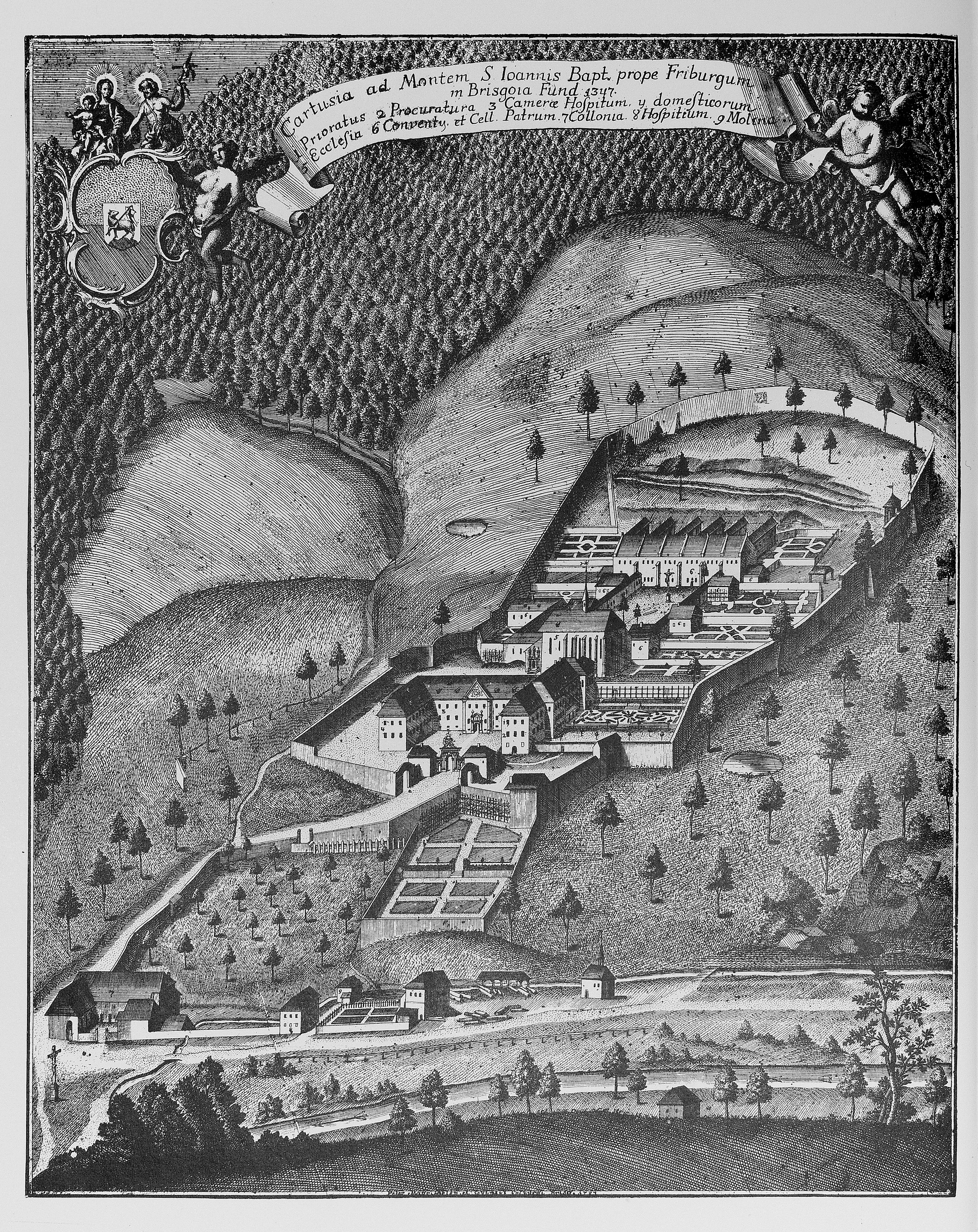 Die Kartause am Johannisberg im Dreisamtal bei Freiburg